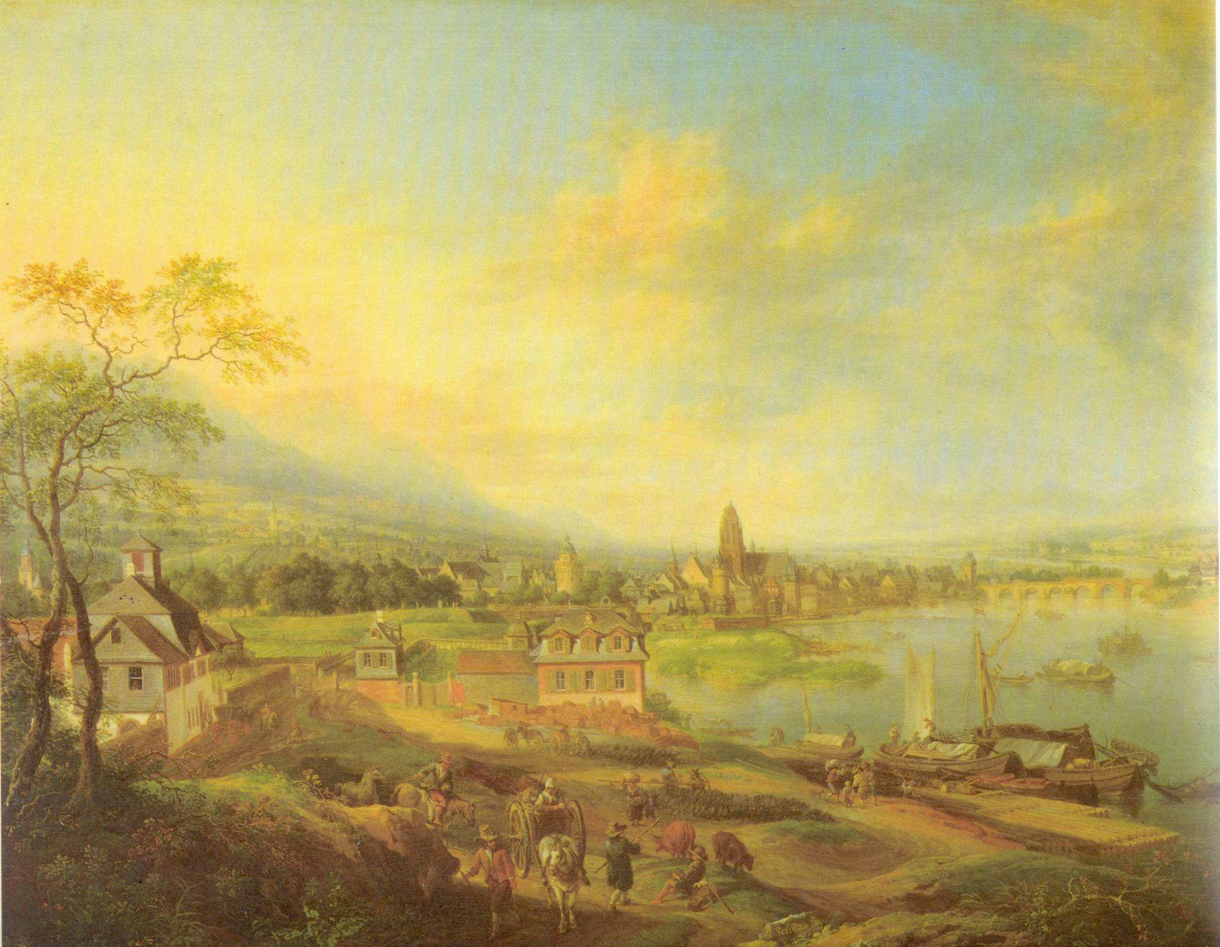 Das Bild zeigt den Guaitaschen und den Loënschen Garten, das Mainzer Bollwerk, dahinter das Mainufer von der Leonhardskirche bis zur Alten Brücke. Die Taunusberge sind überhöht und idealisiert.